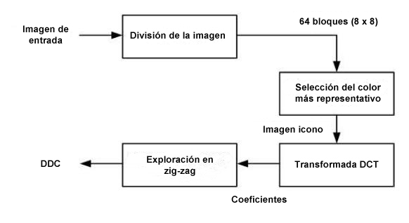 Esquema del proceso de extraccion de valores para obtener los DDC (Descriptores de las Distribuciones del Color) de una imagen.